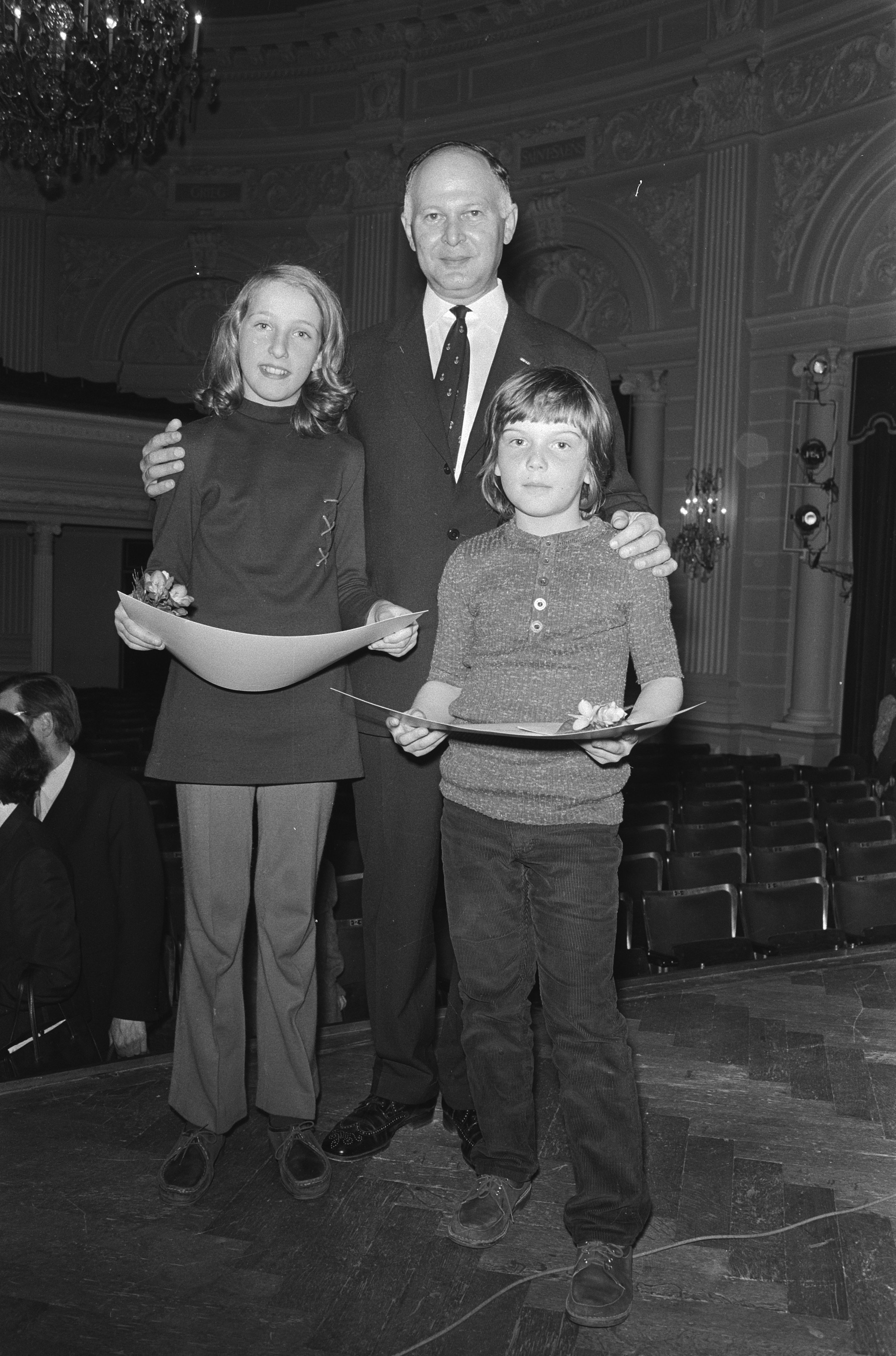 Collectie / Archief : Fotocollectie Anefo Reportage / Serie : Prijsuitreiking van het Nationaal Vioolconcours voor jonge amateurs Beschrijving : Violist Theo Olof met Iris Juda (l) en Jaap van Zweden, beiden eerste in hun categorie Datum : 3 april 1971 Trefwoorden : concoursen, kinderen, musici, prijsuitreikingen Persoonsnaam : Juda, Iris, Olof, Theo, Zweden, Jaap van Fotograaf : Fotograaf Onbekend / Anefo Auteursrechthebbende : Nationaal Archief Materiaalsoort : Negatief (zwart/wit) Nummer archiefinventaris : bekijk toegang 2.24.01.05 Bestanddeelnummer : 924-4231